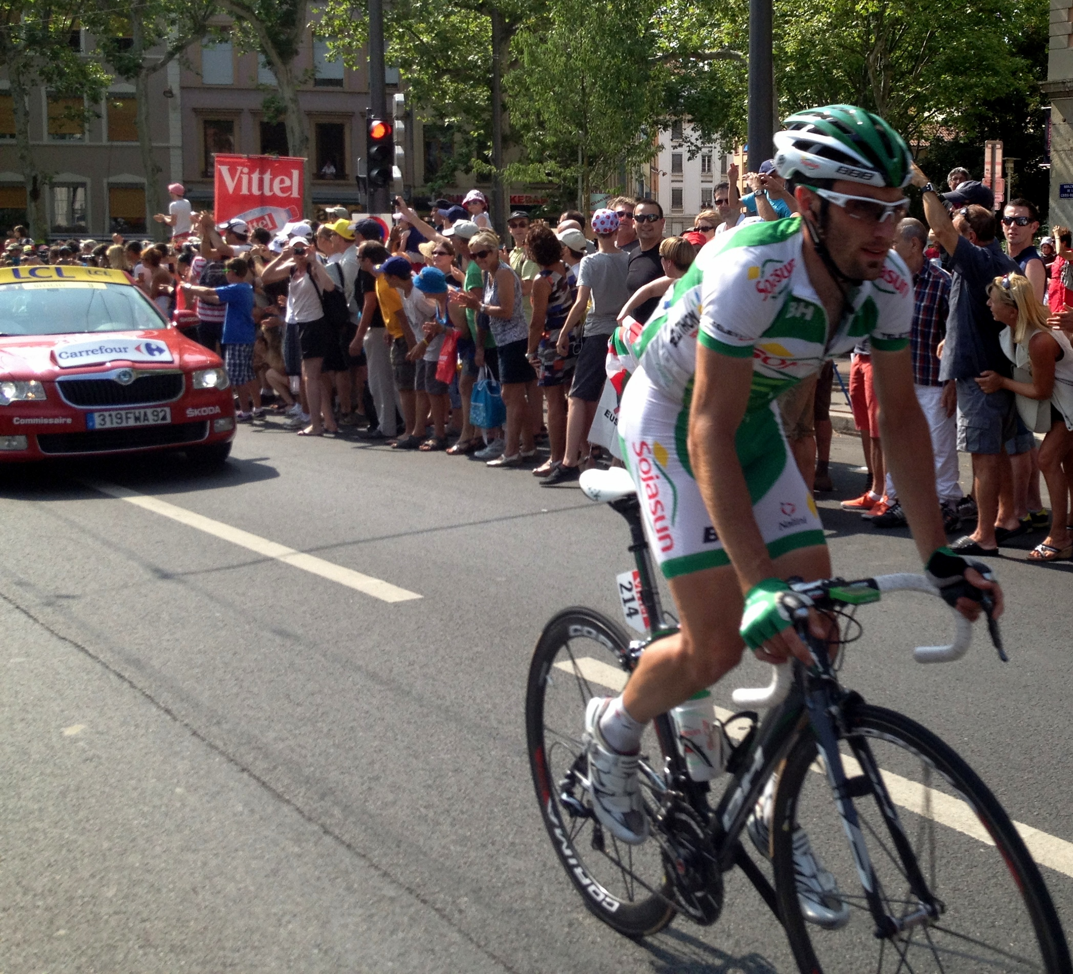 Etape 14 du Tour de France 2013.